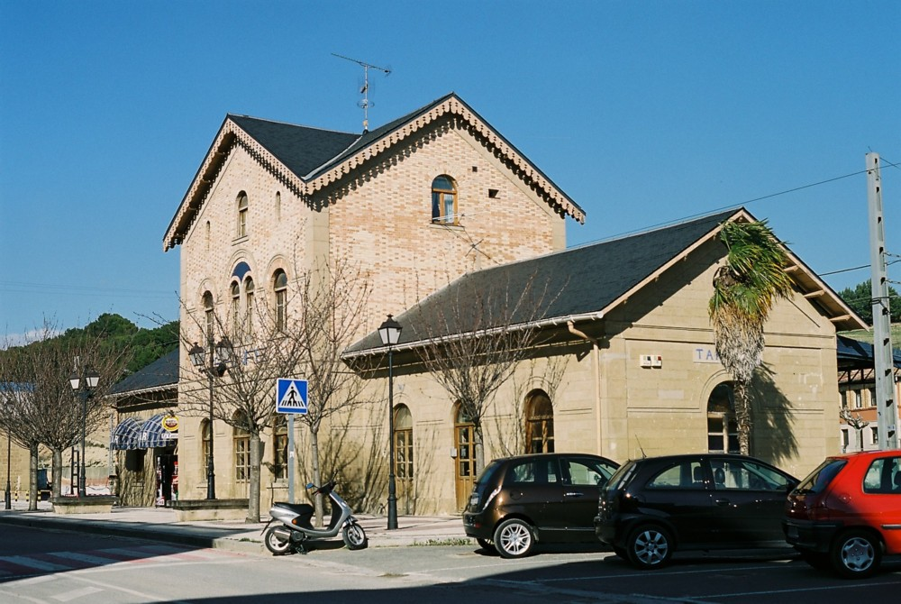 Estación de Tafalla (Navarra).